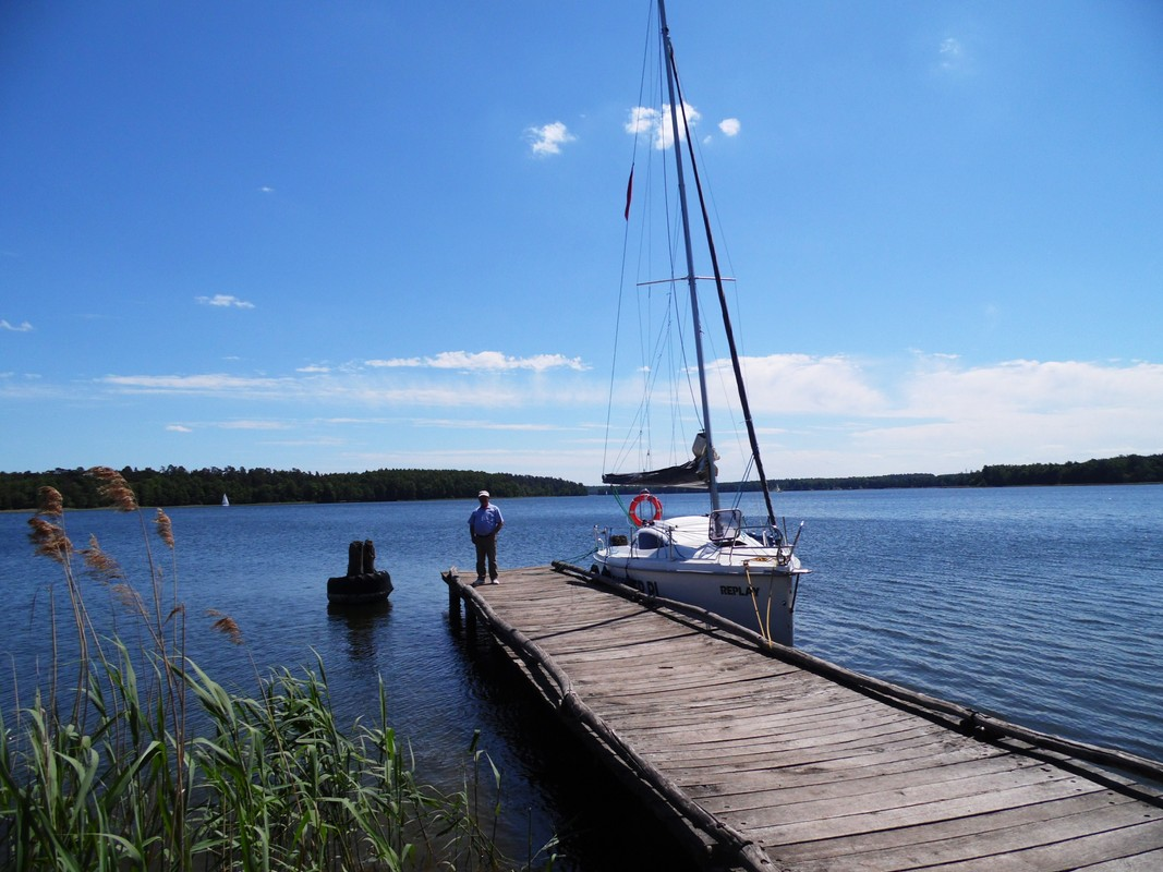 GALINDIA. MOLO NAD JEZIOREM BEŁDANY.